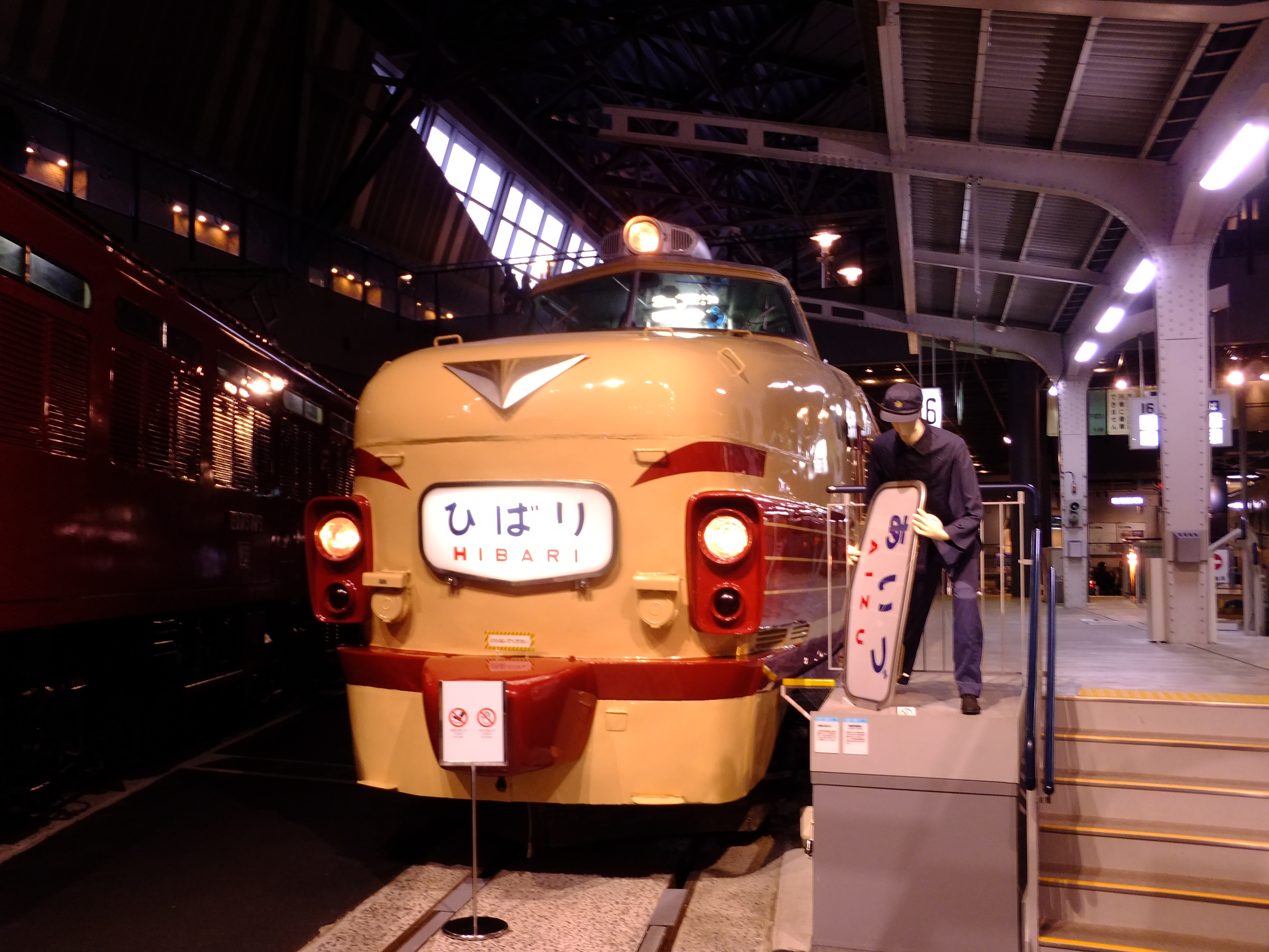 国鉄485系電車クハ481-26。上野駅での折り返しにおける、ヘッドマークの交換をイメージしたシーンである。